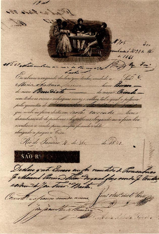 Recibo de compra e venda de escravos. Rio de Janeiro, 1851.